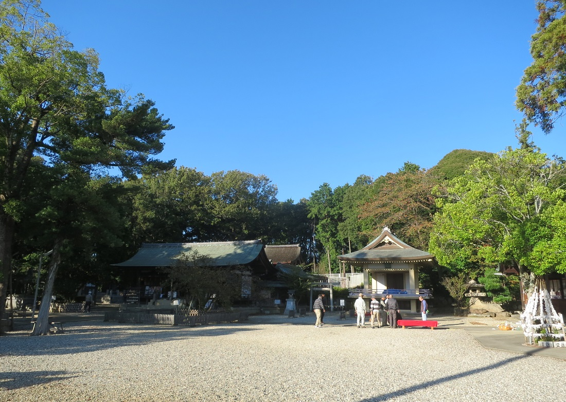 岡崎市 上地八幡宮